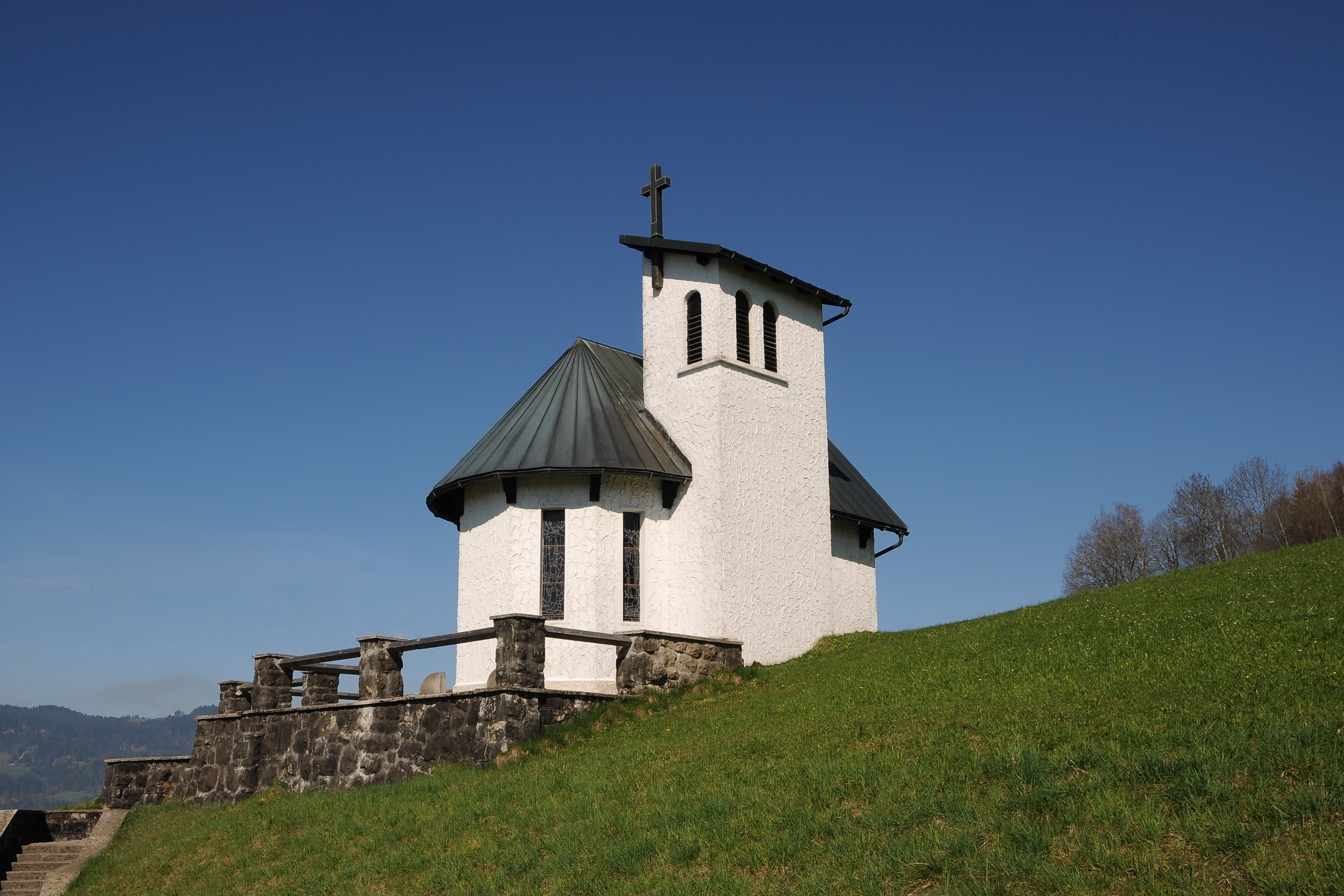 aus dem DEHIO Vorarlberg 1983: Kapelle in Brenden, (Doren). Anstelle eines Vorgängerbaues (bestanden bis 1908) 1936-1938 von Hermann Keckeis neugebaut. Einschiffig mit polygonaler Apsis. Turm an der Seite des Schiffes mit Pultdach. Im Inneren Trambalken und Holzempore. Wandbild mit Glasfenster von Walter Bjelik. Wandbild Maria Immaculata. Glasfenster Hll. Wendelin, Anna, Theresa, Judas Thaddäus.